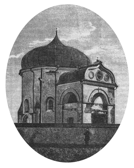 Василівська ротонда. Ліногравюра кін. 19 ст.